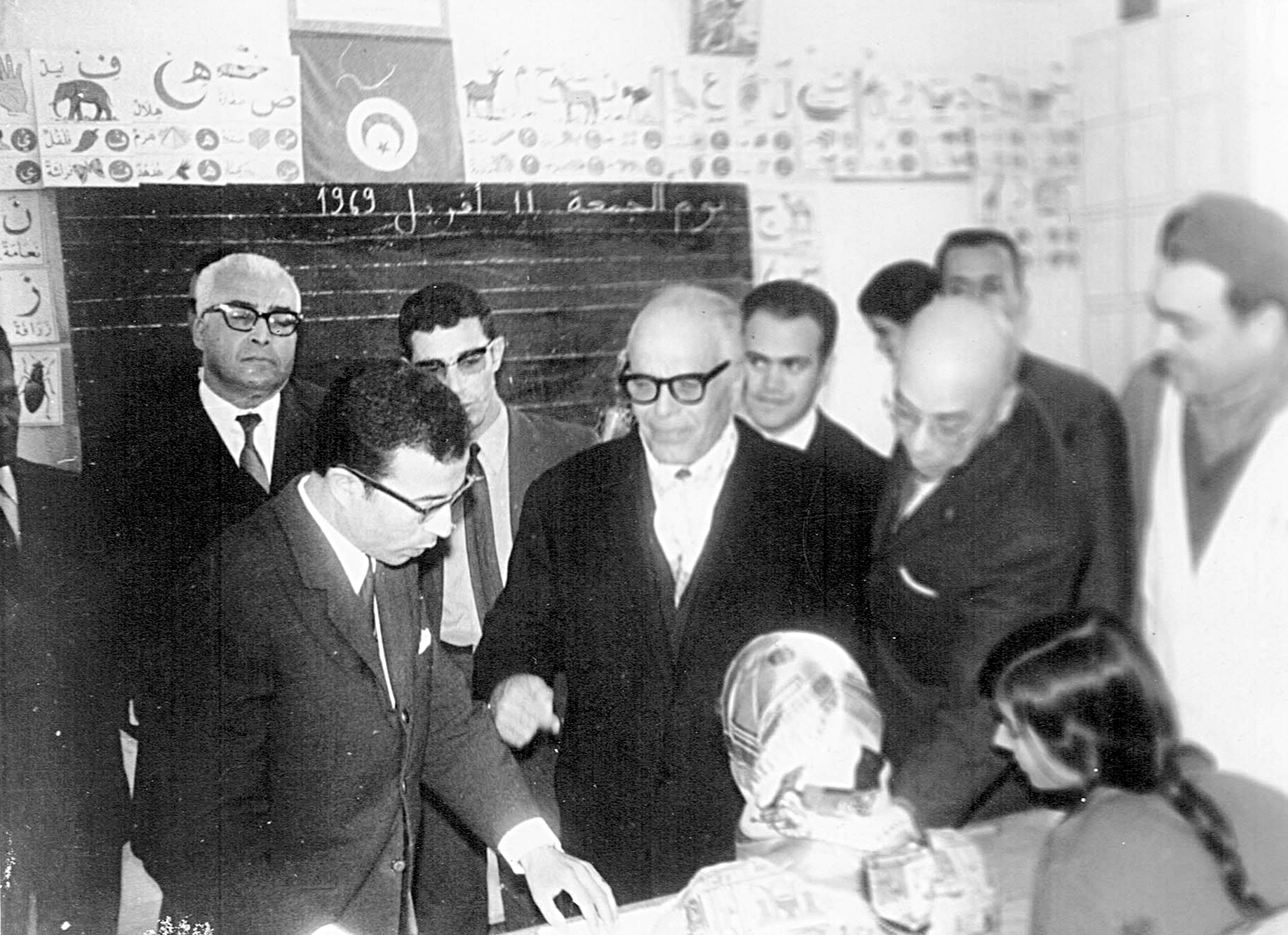 Habib Bourguiba visite une salle de classe dans la localité de Sayada.